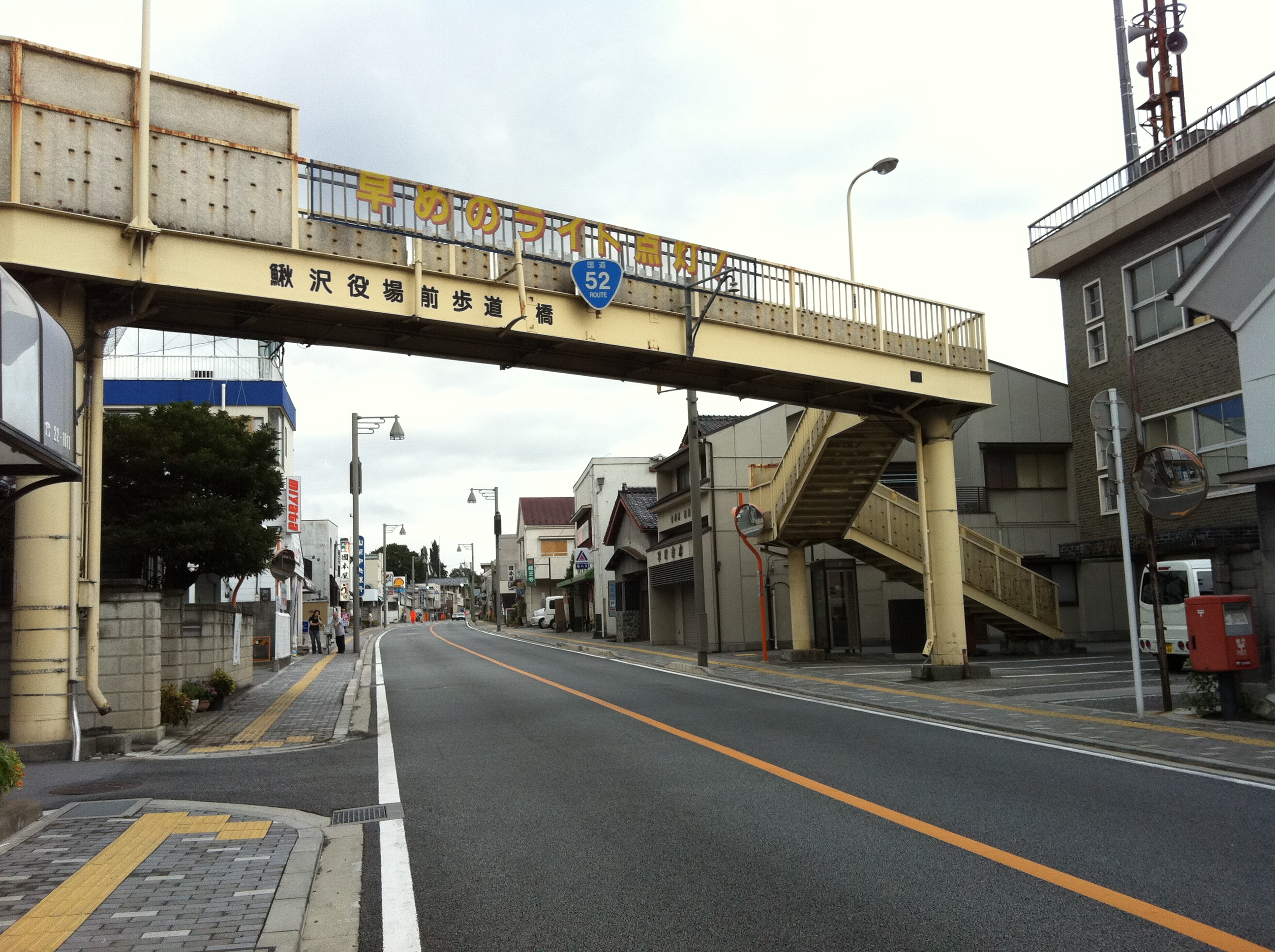 山梨県道42号（撮影時は国道52号） 富士川町（旧鰍沢町）内